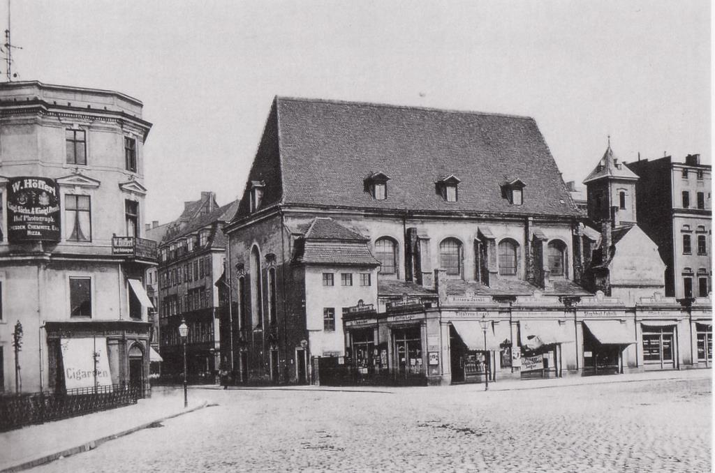 Alte Peterskirche Leipzig, Ansicht von Süden.